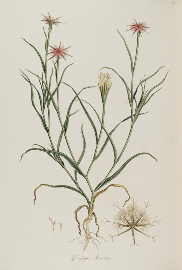 Legende: Äußere Zungenblüte (x1). b Innere Zungenblüte (x1). c Körbchen, fruchtend (x1).